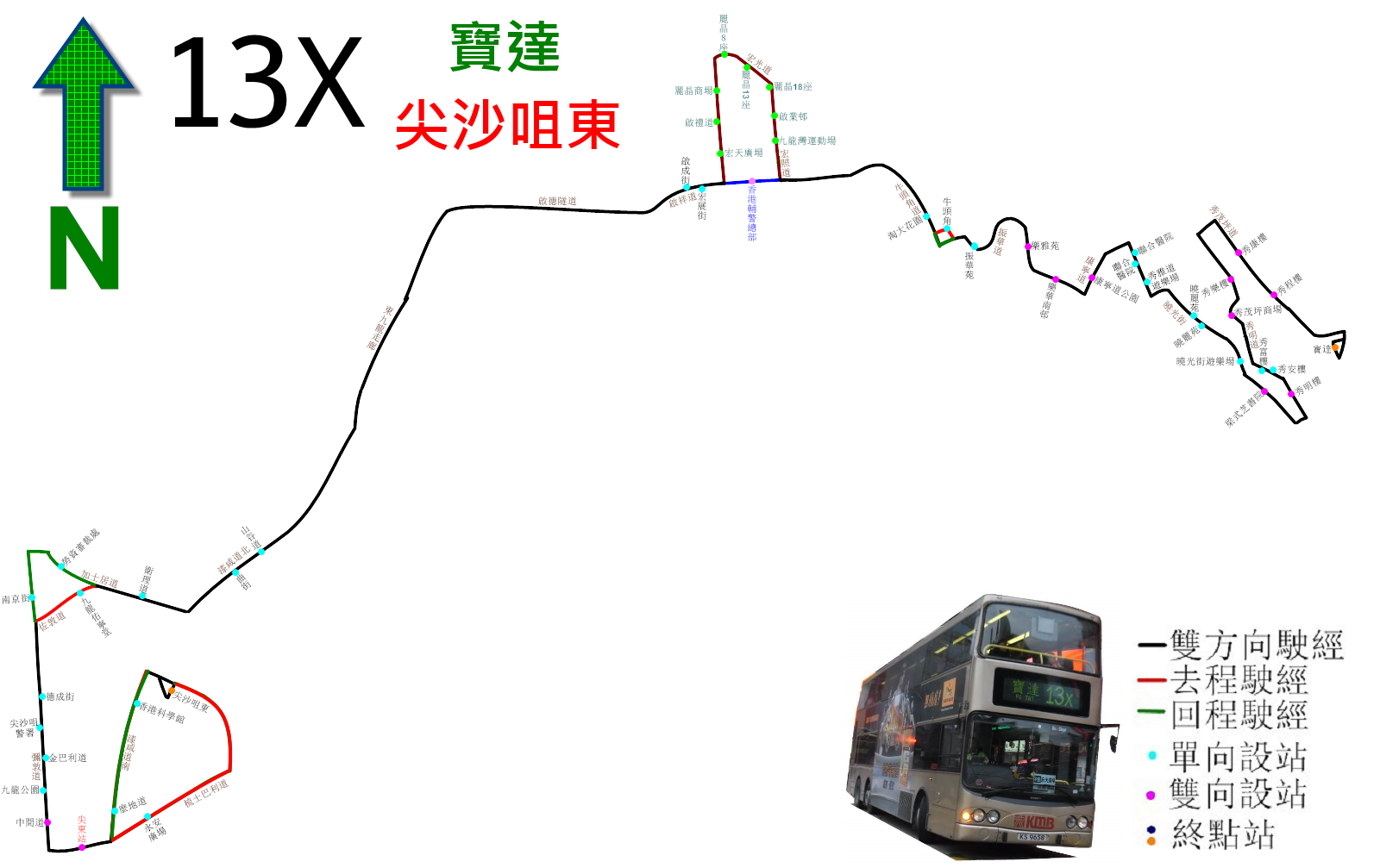 中文（香港）: 九巴13X線的走線圖